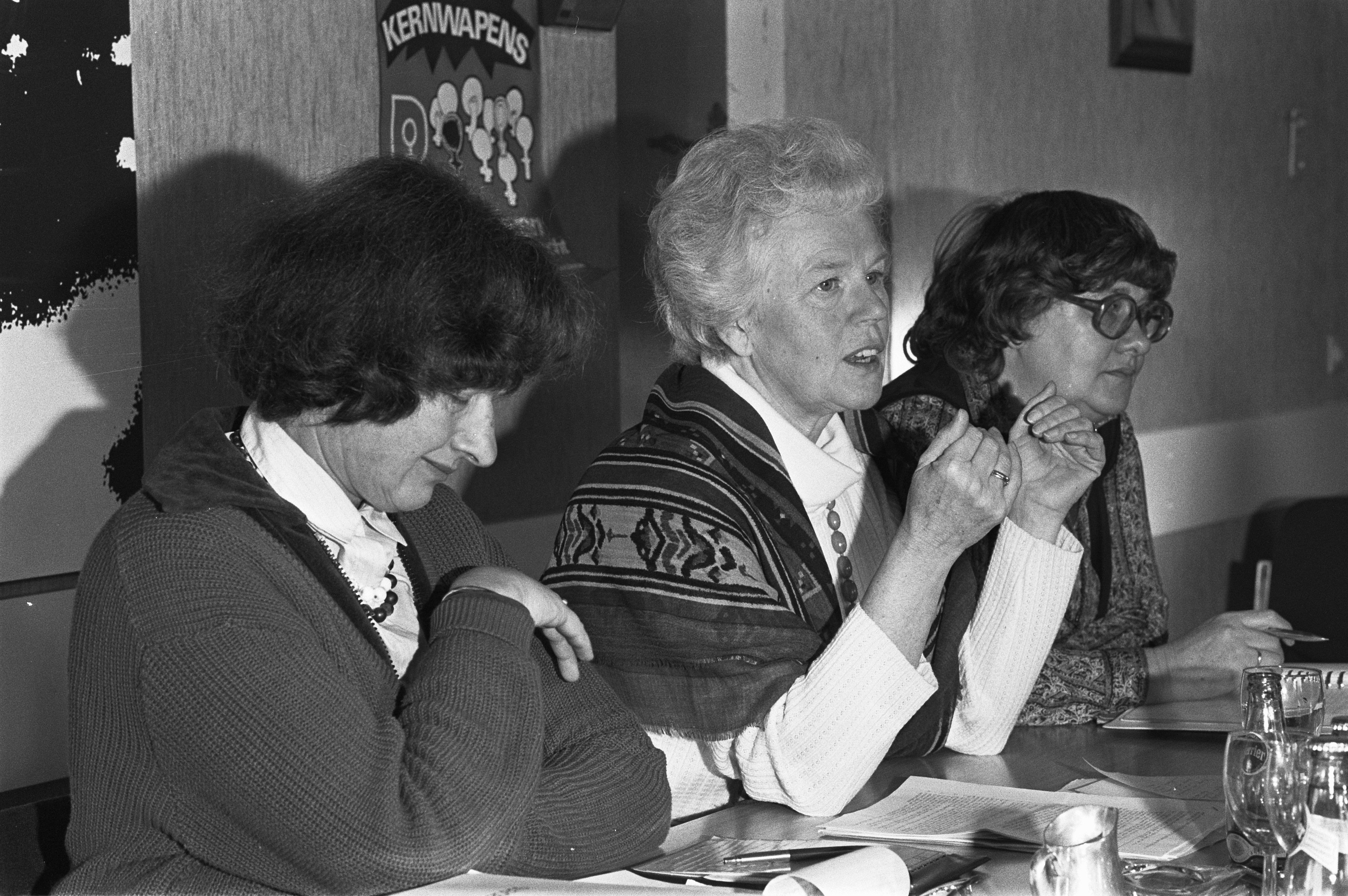 Collectie / Archief : Fotocollectie Anefo Reportage / Serie : Persconferentie in Nieuwspoort door Vrouwen voor de Vrede en Vrouwen tegen Kernwapens over de Internationale Vrouwen Conferentie, 27-29 november in Amsterdam Beschrijving : Van links naar rechts Sonja van Gaast-Bakker Schut (Vrouwen tegen kernwapens), Sienie Strikwerda (voorzitter Vrouwenraad en Vrouwen voor vrede) en Adriane van Melle-Hermans (Vrouwen voor vrede) tijdens de persconferentie Datum : 24 november 1981 Locatie : Den Haag, Zuid-Holland Trefwoorden : persconferenties, vredesbeweging, vrouwen Persoonsnaam : Gaast-Bakker Schut, Sonja van der, Melle-Hermans, Adriënne M.C. van, Strikwerda, Sienie Fotograaf : Antonisse, Marcel / Anefo Auteursrechthebbende : Nationaal Archief Materiaalsoort : Negatief (zwart/wit) Nummer archiefinventaris : bekijk toegang 2.24.01.05 Bestanddeelnummer : 931-8225